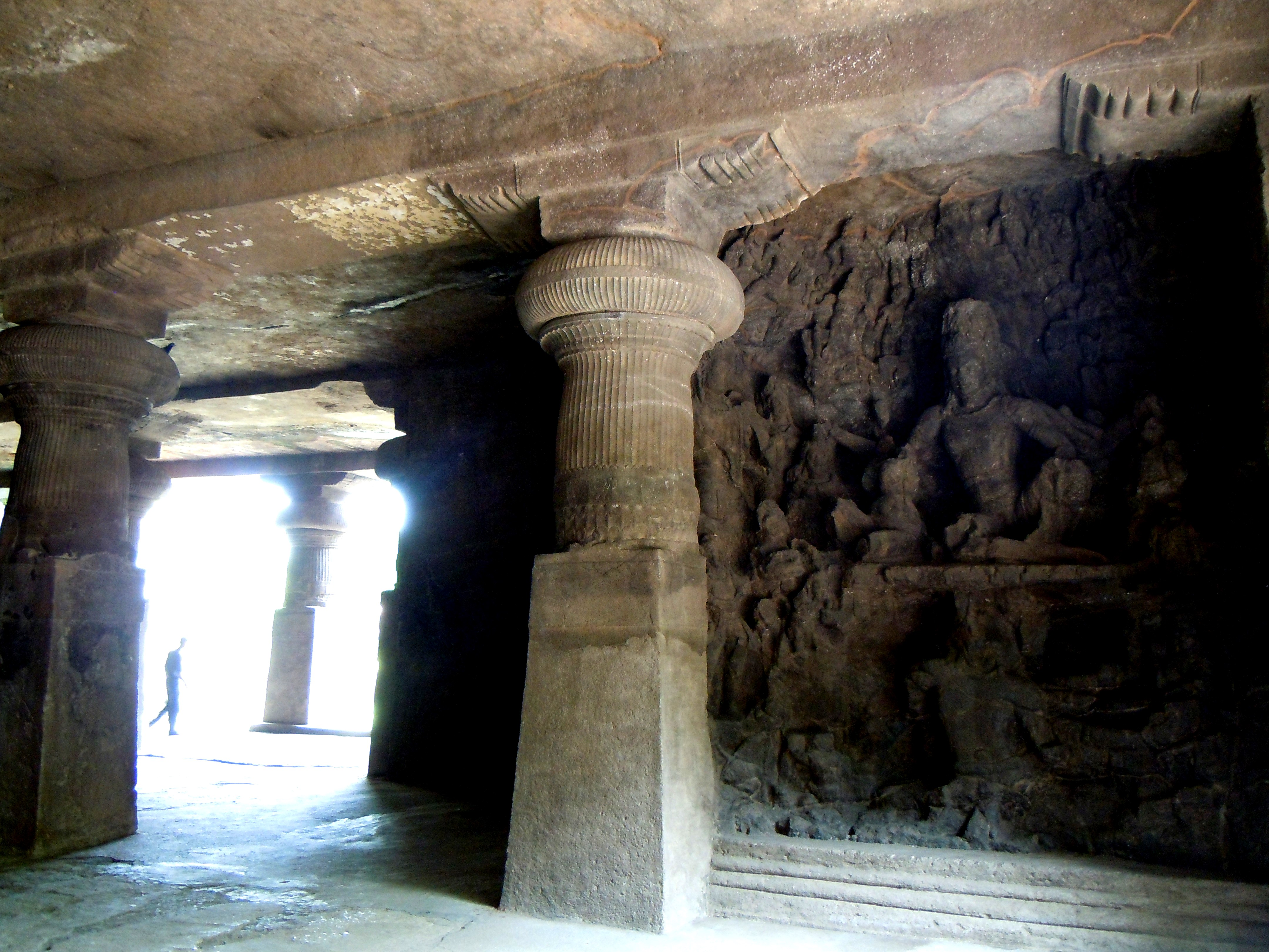 Grottes d'Elephanta - grotte principale: le démon Ravana essaie d'arracher la Kailasa, la montagne de Shiva.